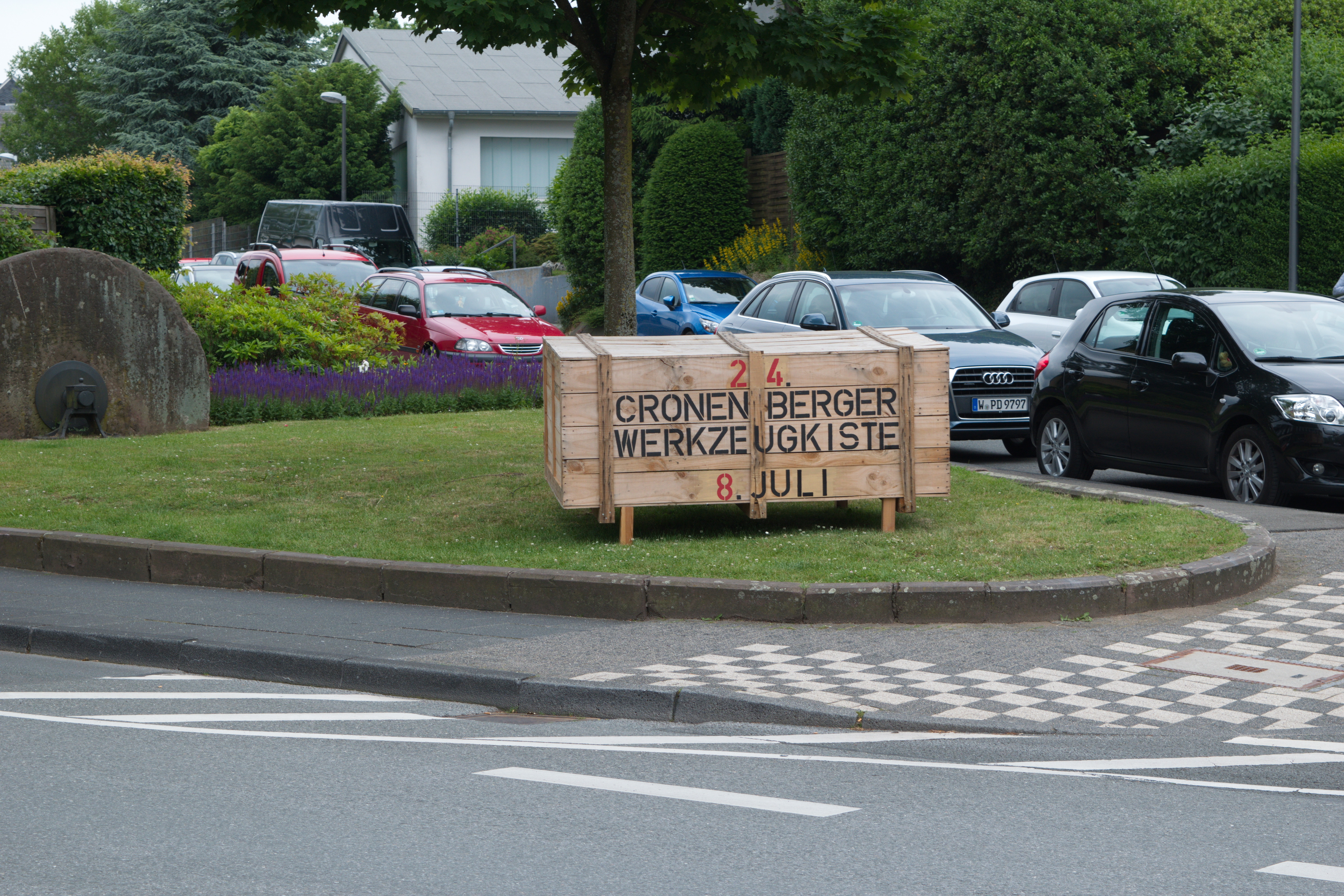 Hauptstraße, Wuppertal